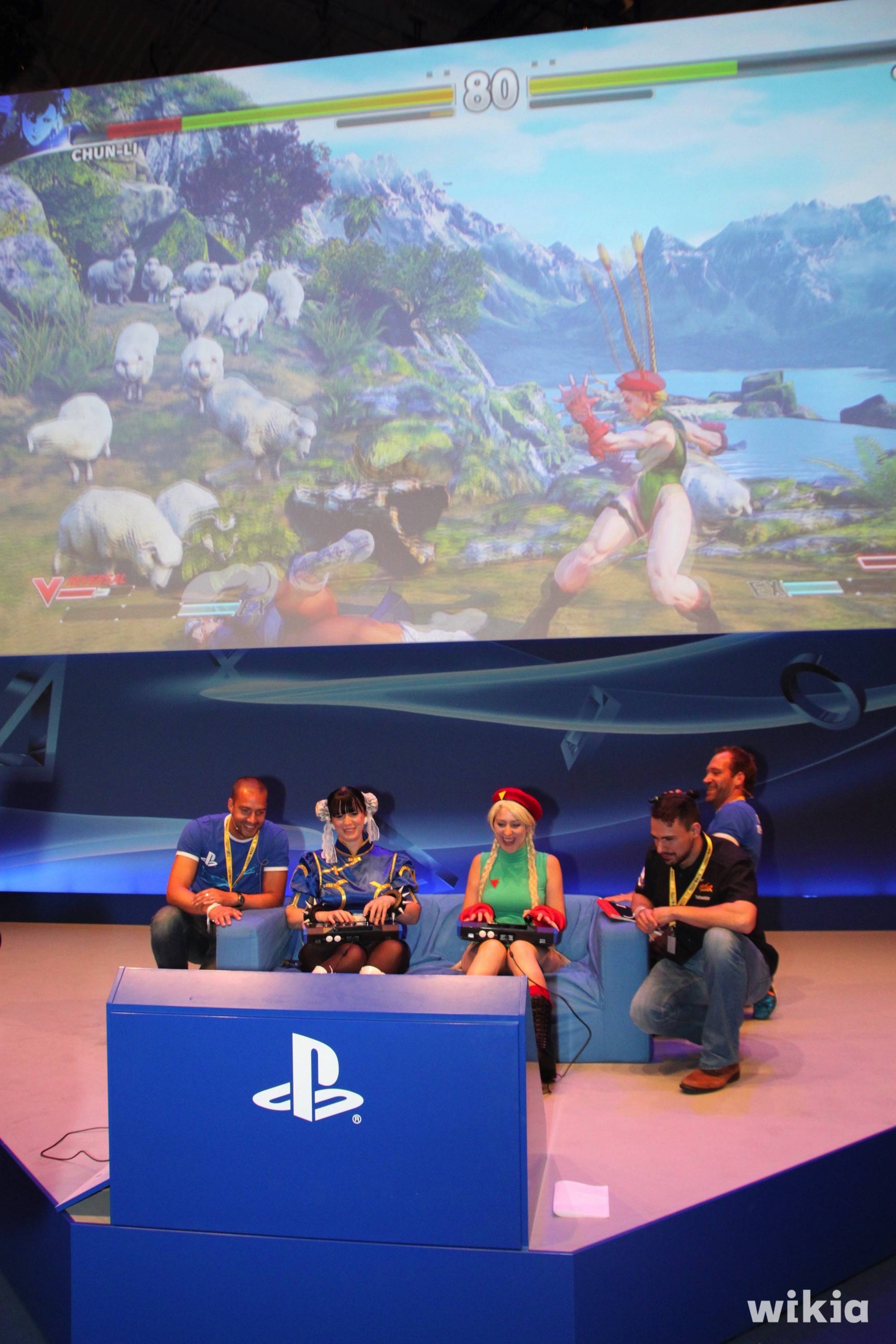 Impressionen: Erster Tag, Mittwoch. Gamescom 2015 impressions